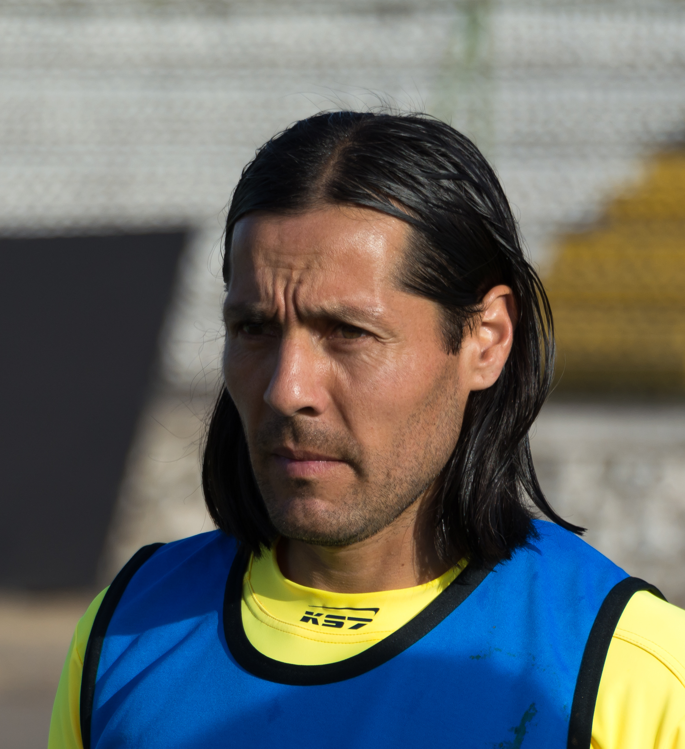 Hugo Droguett, Palestino v Universidad de Concepción, Estadio Municipal de La Cisterna, La Cisterna, Santiago, Región Metropolitana, Chile.